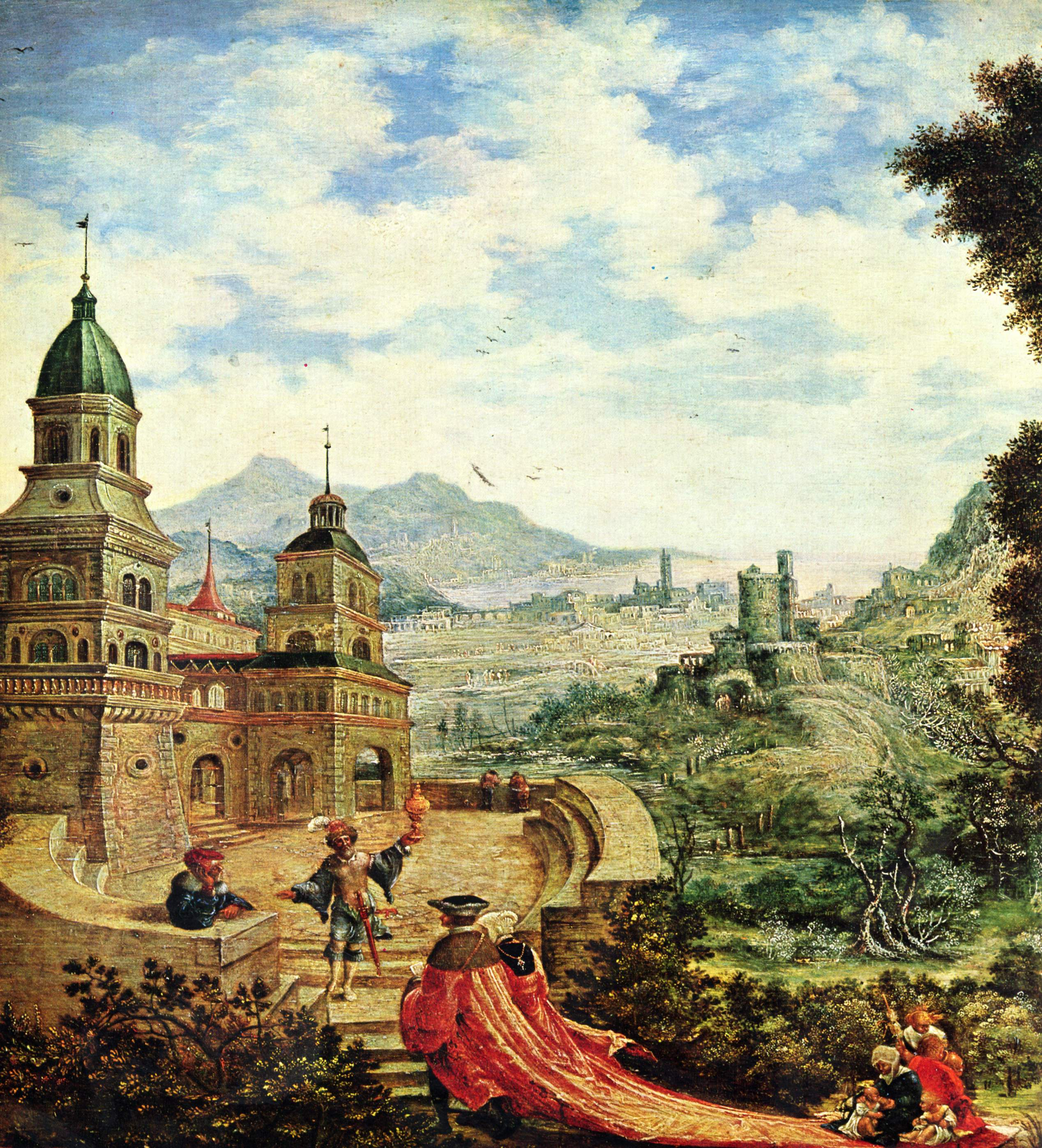 detail